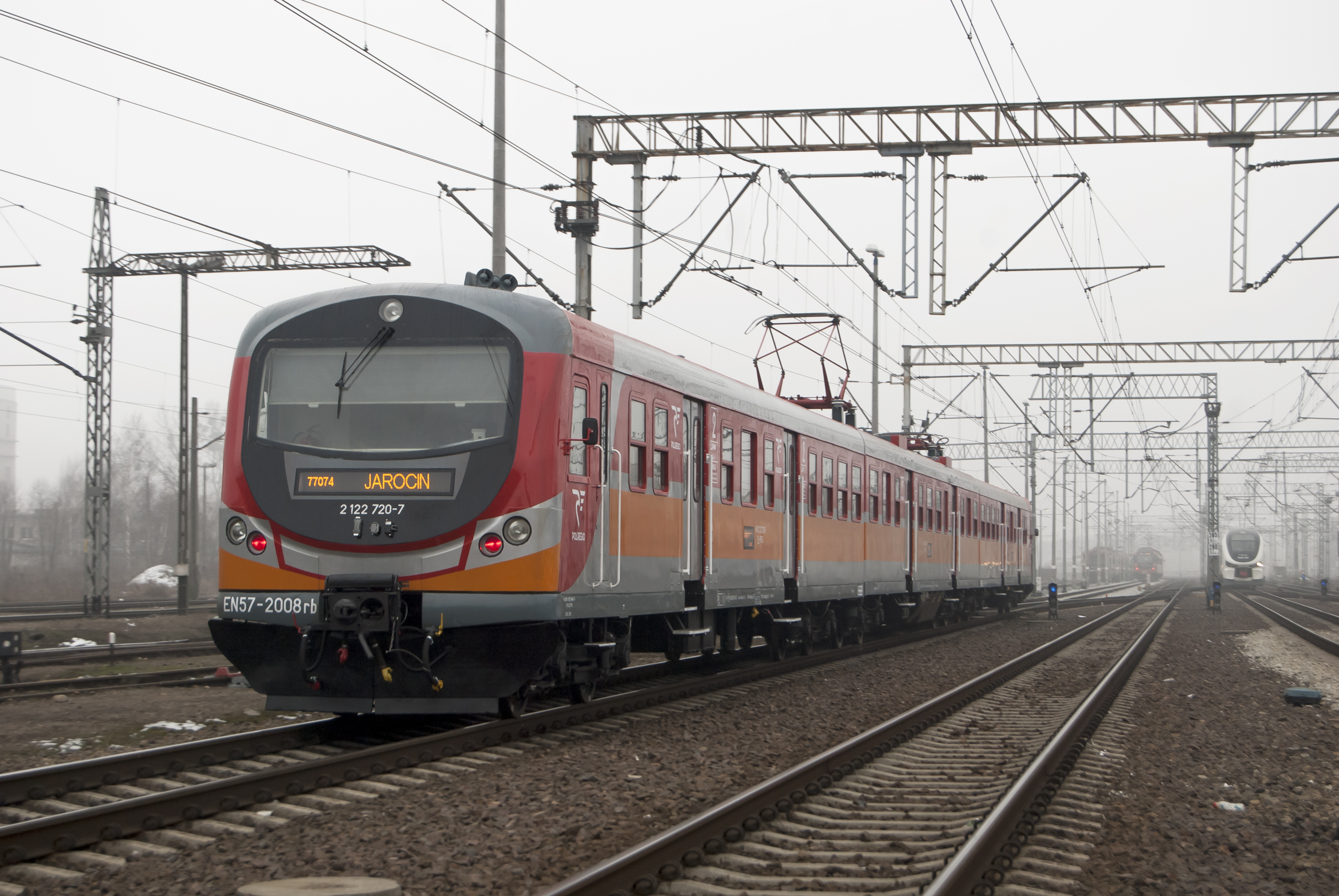 Zmodernizowana jednostka serii EN57 należąca do POLREGIO